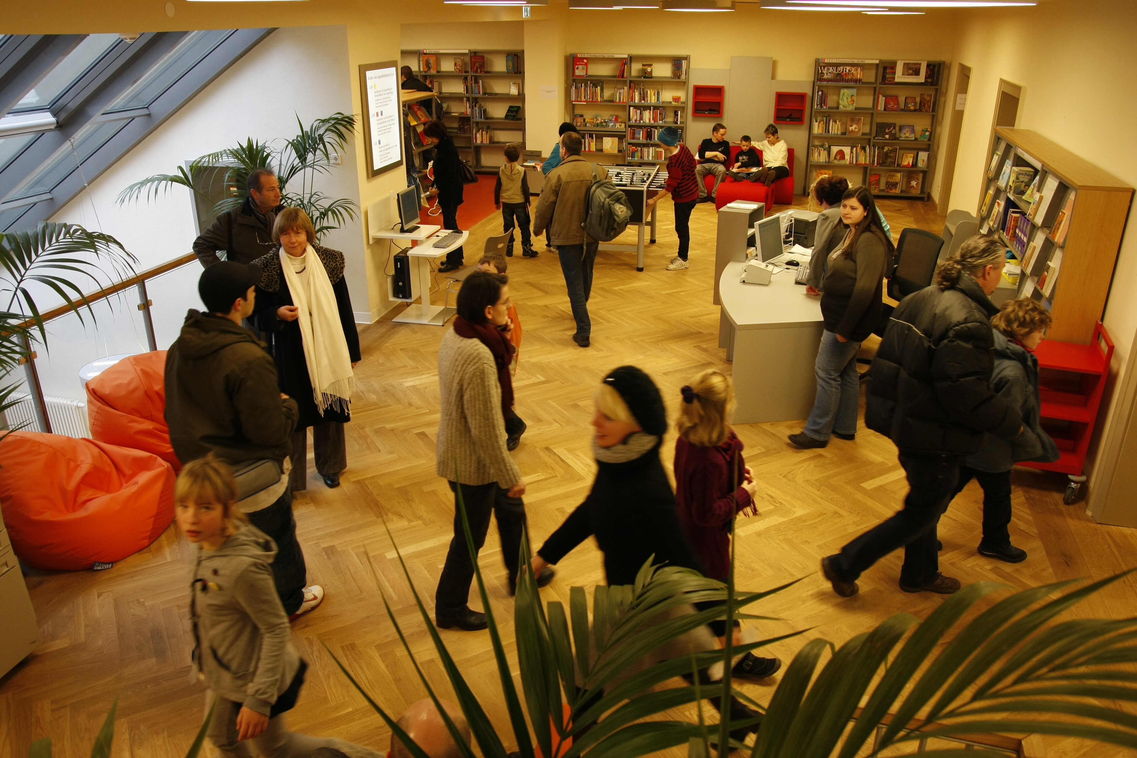 Blick in die erste etage der Kinder- und Jugendbibliothek